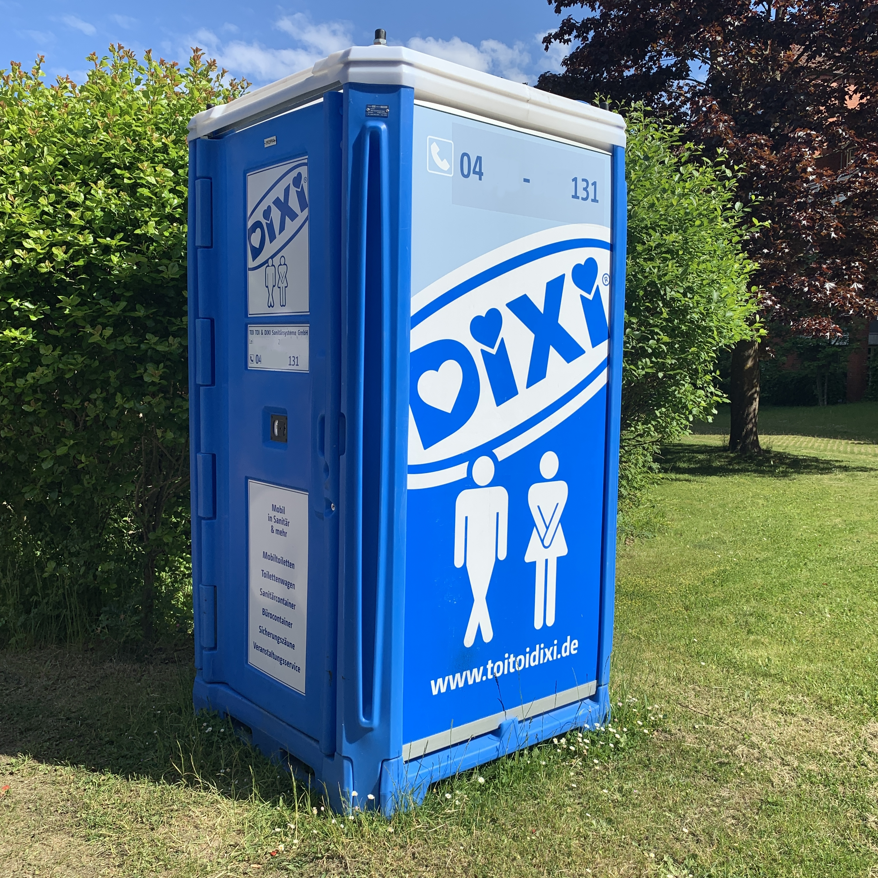 "Dixiklo" in Kiel (2020)